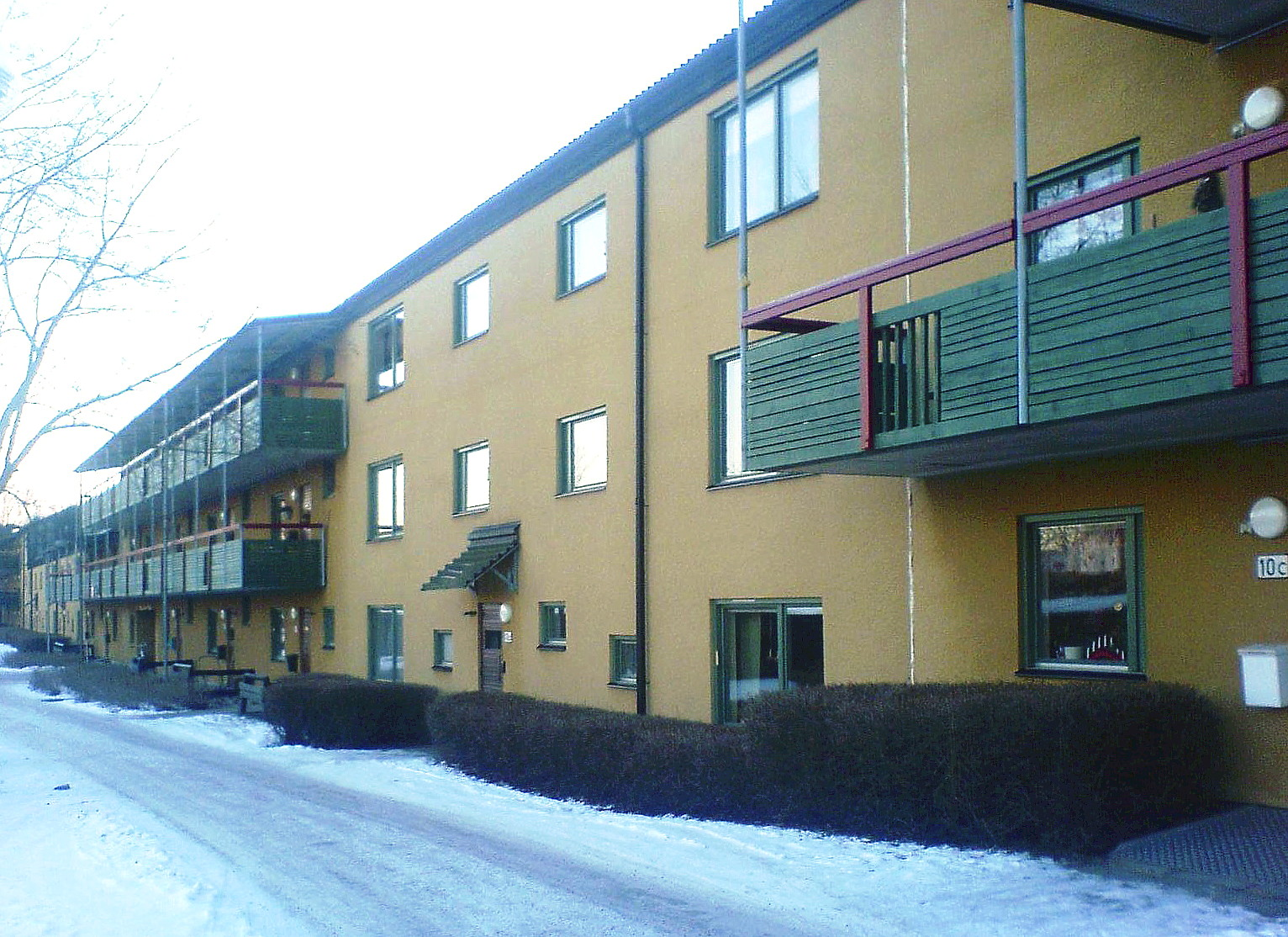 Nya bruket. Ralf Erskin heter arkitekten.